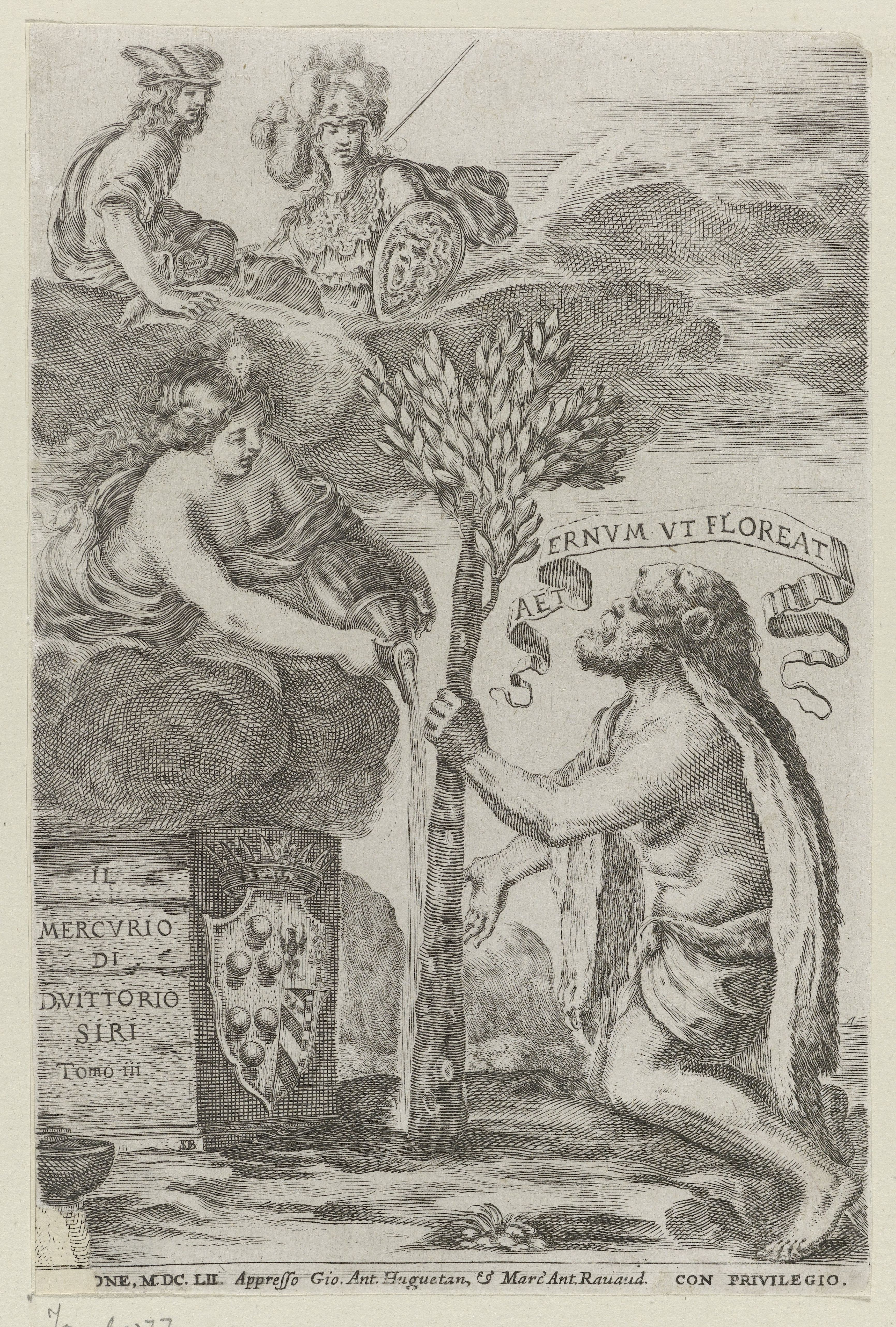 IdentificatieTitel(s): Hercules plant een boomTitelpagina voor: Vittorio Siri, Mercurio, Tomo III, 1662Objecttype: prent titelpagina Objectnummer: RP-P-OB-35.173Catalogusreferentie: De Vesme (Della Bella) 960-2(2)Jombert (Della Bella) 177Opschriften / Merken: verzamelaarsmerk, verso, gestempeld: Lugt 240Omschrijving: Hercules zit geknield bij een jonge boom die hij zojuist heeft geplant. Links verschijnt een vrouw op een wolk (de Waar: dheid?) die de boom water geeft. Onder haar het wapen van de familie Della Rovere. Linksboven zitten Mercurius en Minerva op een wolk.VervaardigingVervaardiger: prentmaker: Stefano della Bella (vermeld op object)uitgever: Marcantonio Ravaud (vermeld op object)uitgever: Giovanni Antonio Huguetan (vermeld op object)verlener van privilege: onbekend (vermeld op object)Plaats vervaardiging: FlorenceDatering: 1662Fysieke kenmerken: etsMateriaal: papier Techniek: etsenAfmetingen: blad: h 201 mm (Binnen plaatrand afgesneden.) × b 133 mm (Binnen plaatrand afgesneden.)ToelichtingTitelpagina voor: Siri, Vittorio. Mercurio (Tomo III). Florence: Giovanni Antonio Huguetan & Marcantonio Ravaud 1662.OnderwerpWat: (het verhaal van) Hercules (Herakles)Truth; 'VeritÃ ' (Ripa)treeswatering plants(story of) Minerva (Pallas, Athena)(story of) Mercury (Hermes)Verwerving en rechtenVerwerving: overdracht van beheer 1816Copyright: Publiek domein